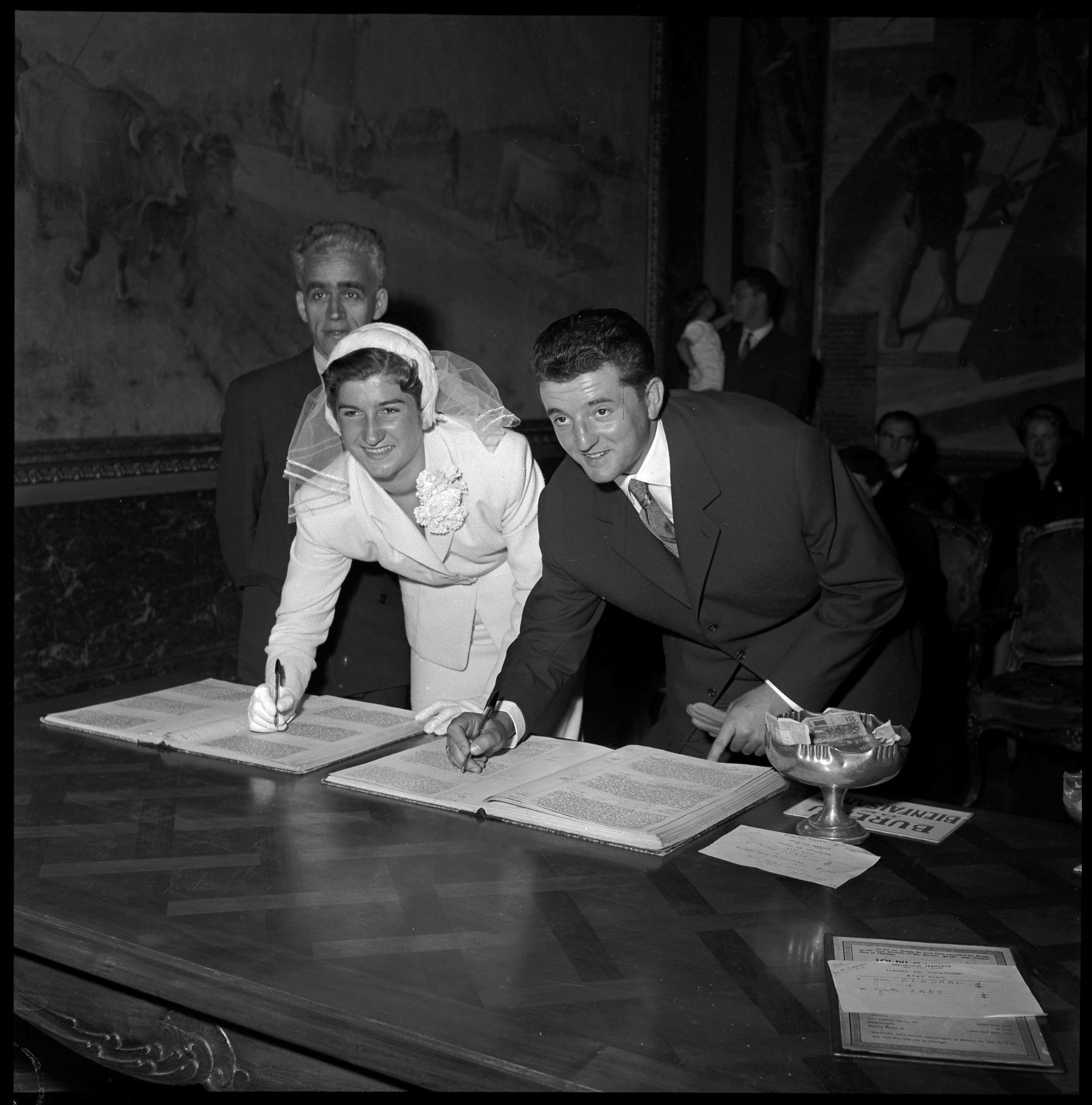 Salle du Capitole. 1954. Vue de Ginette Jany et de son époux signant l'acte de mariage au Capitole.